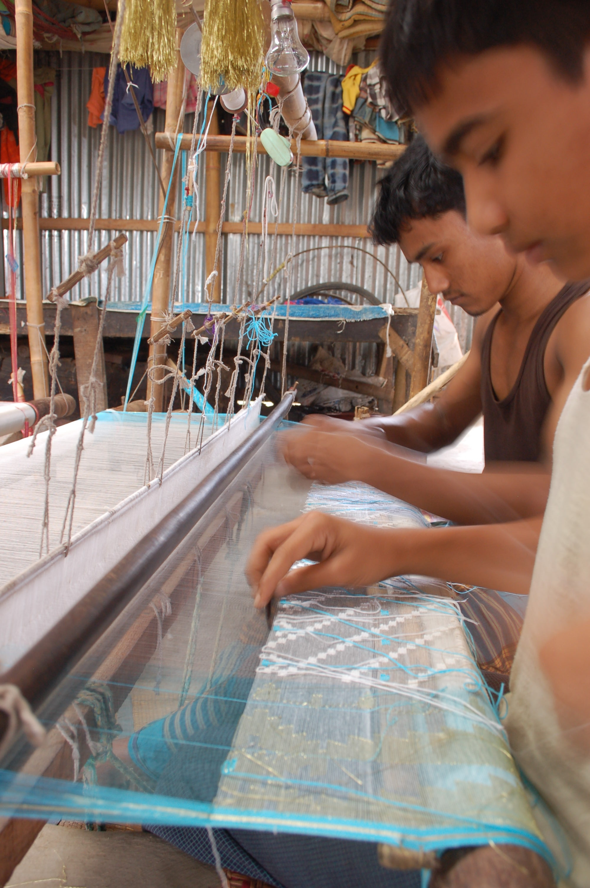 ফুটিয়ে তোলা হচ্ছে অপরূপ নকশা...